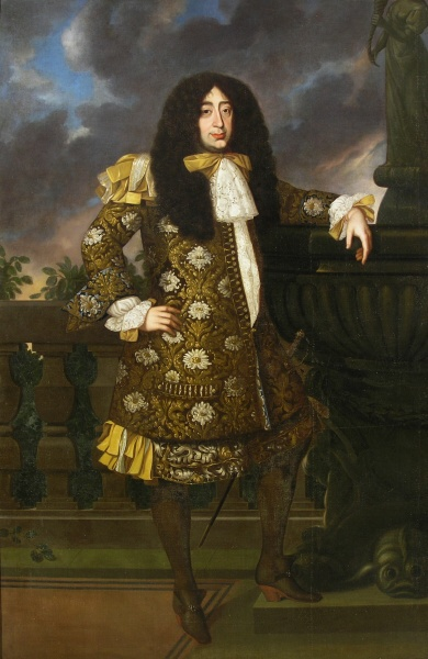 Нохчийн: Ferdinand Vilém Eusebius Schwarzenberg